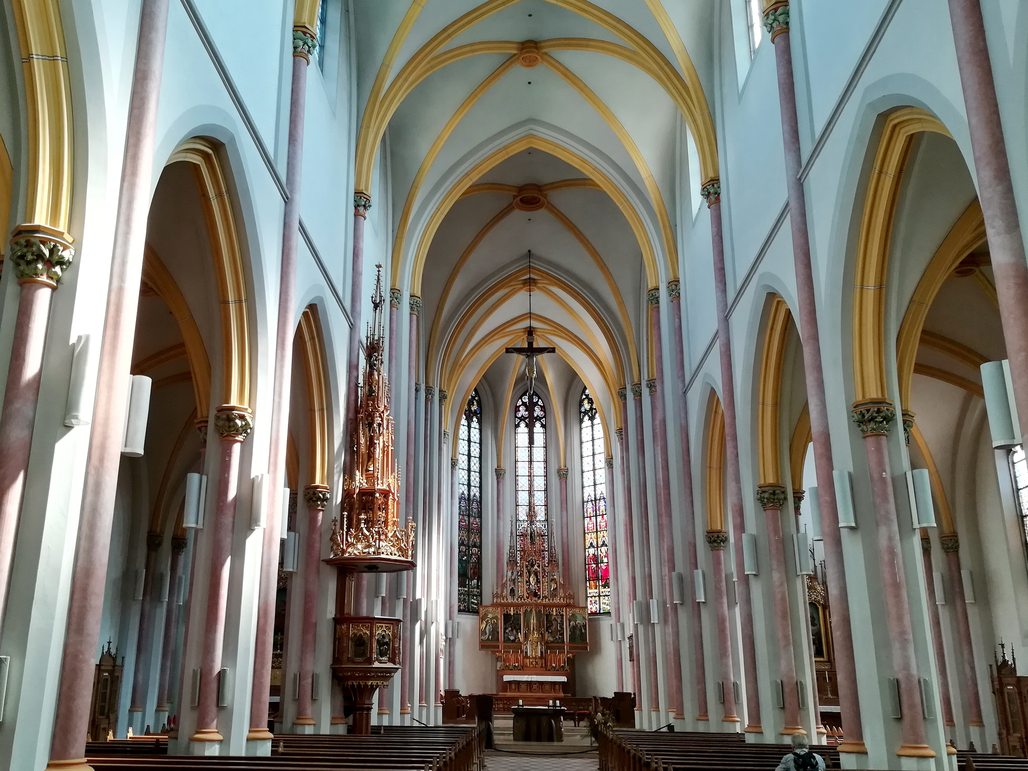 Die katholische Stadtpfarrkirche St. Nikolaus in Zwiesel ist ein neugotischer, aus Backstein errichteter dreischiffiger Kirchenbau mit einem Querschiff und Turm.